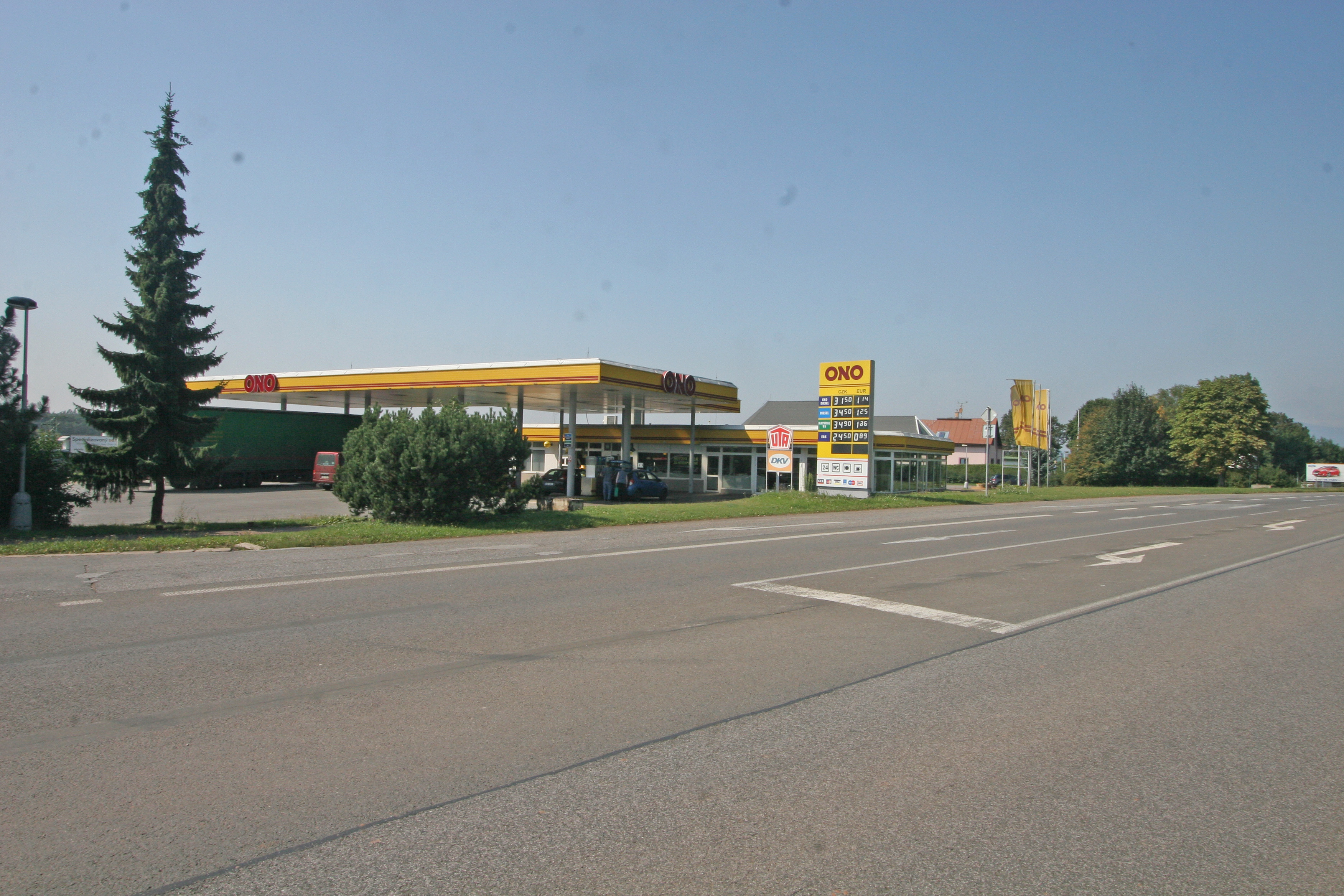 Bojiště benzínka ONO